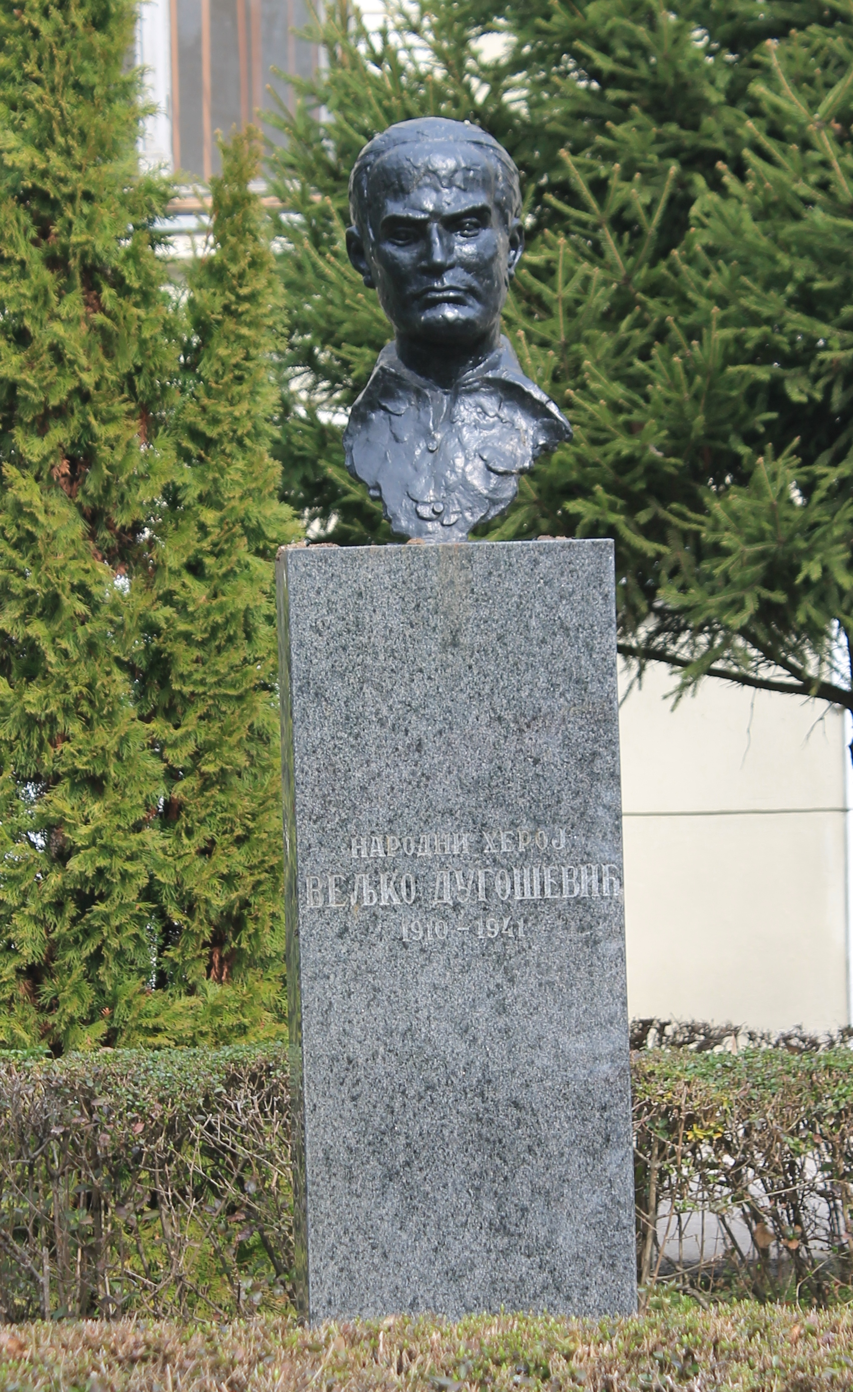 Spomen-bista Veljka Dugoševića ispred oš "Veljko Dugošević" u Rumi, rad vajara Vanje Radauša iz 1969. godine.